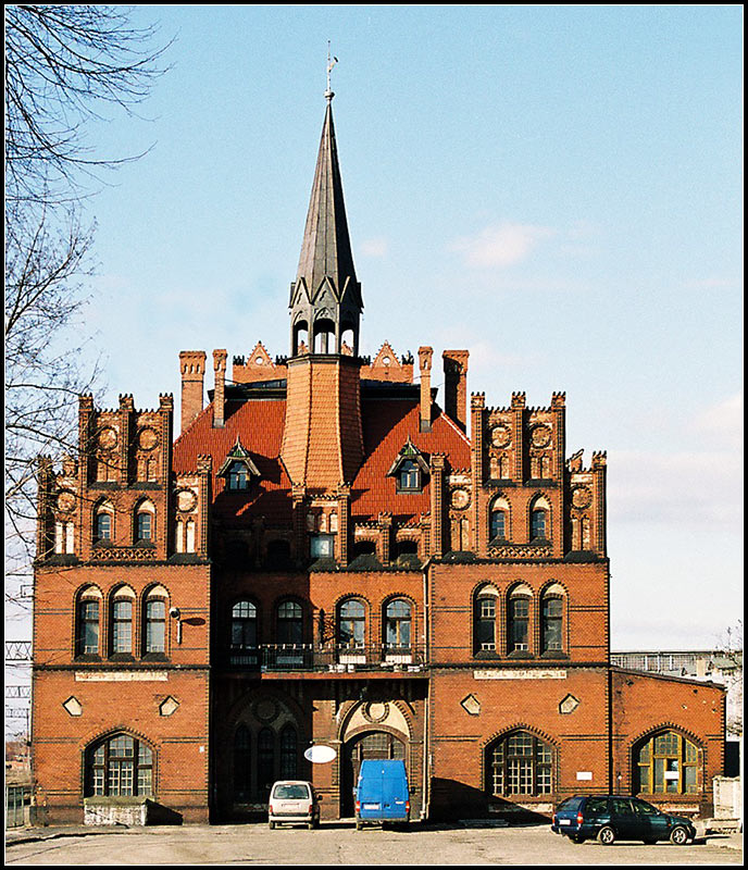 Dworzec w Nowych Skalmierzycach.